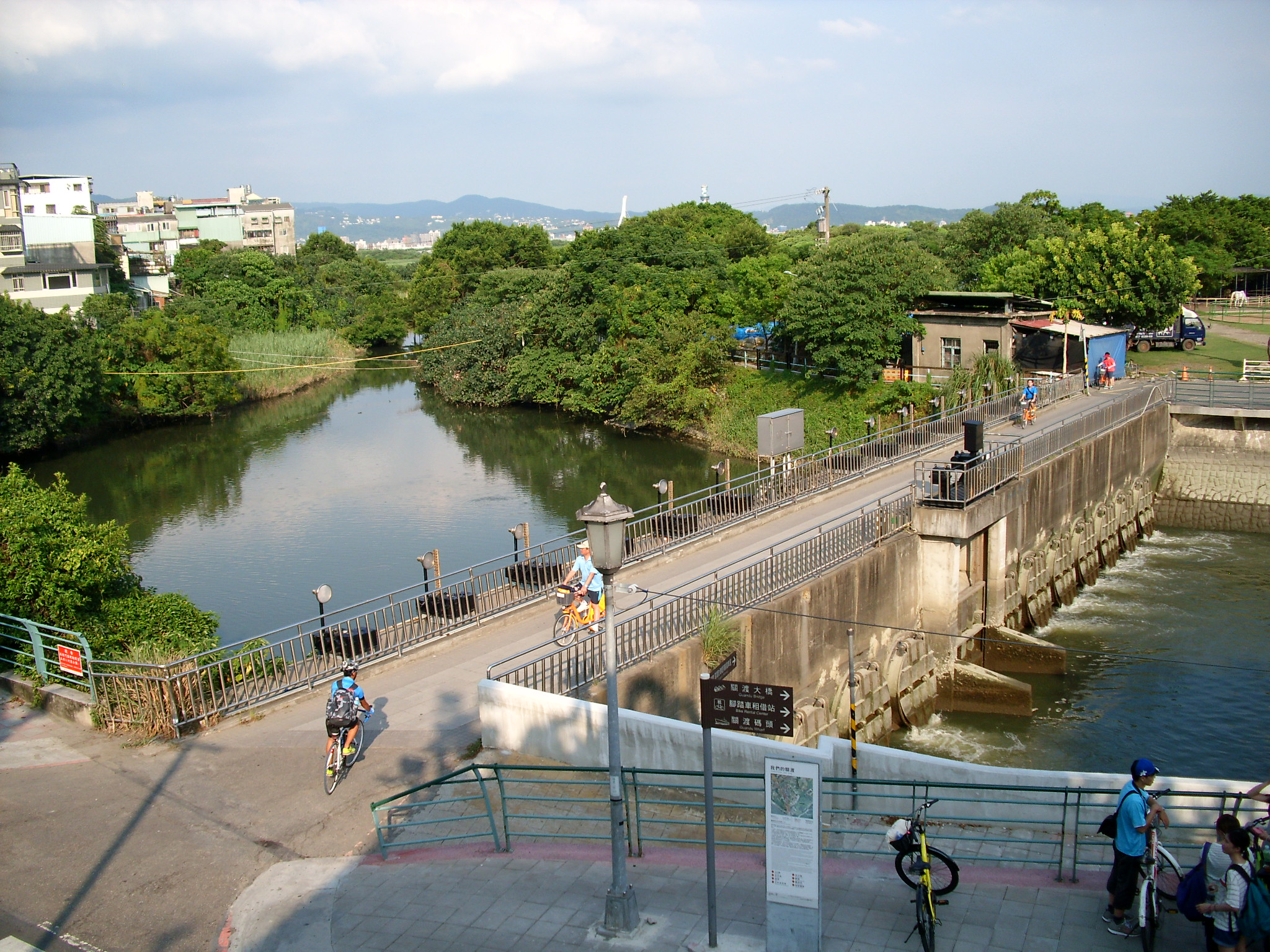 臺灣關渡宮戲臺前方的中港河。